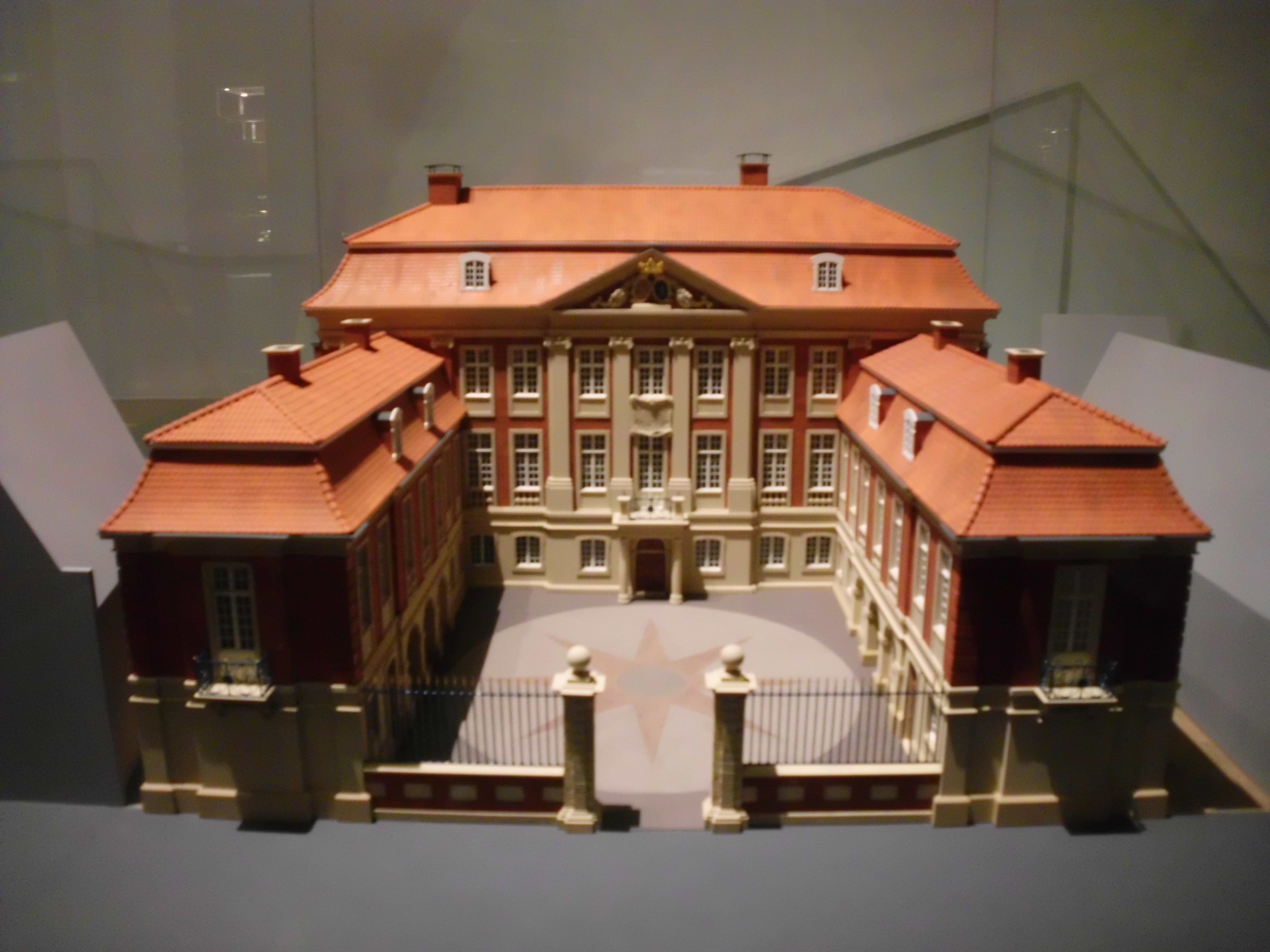 ein Modell des Beverfördischen Hofes im Stadtmuseum Münster